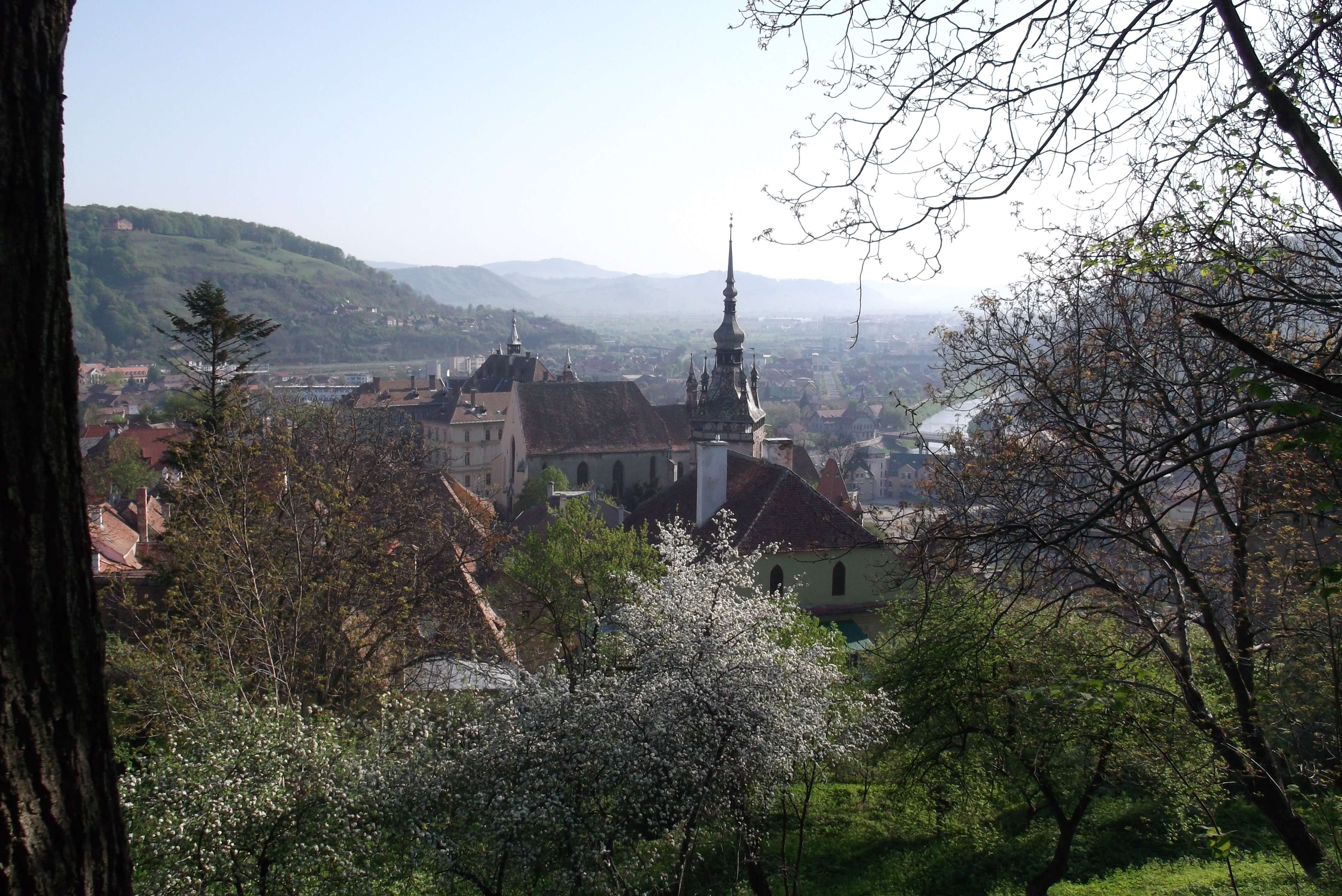 Rumunia, Sighişoara, panorama miasta